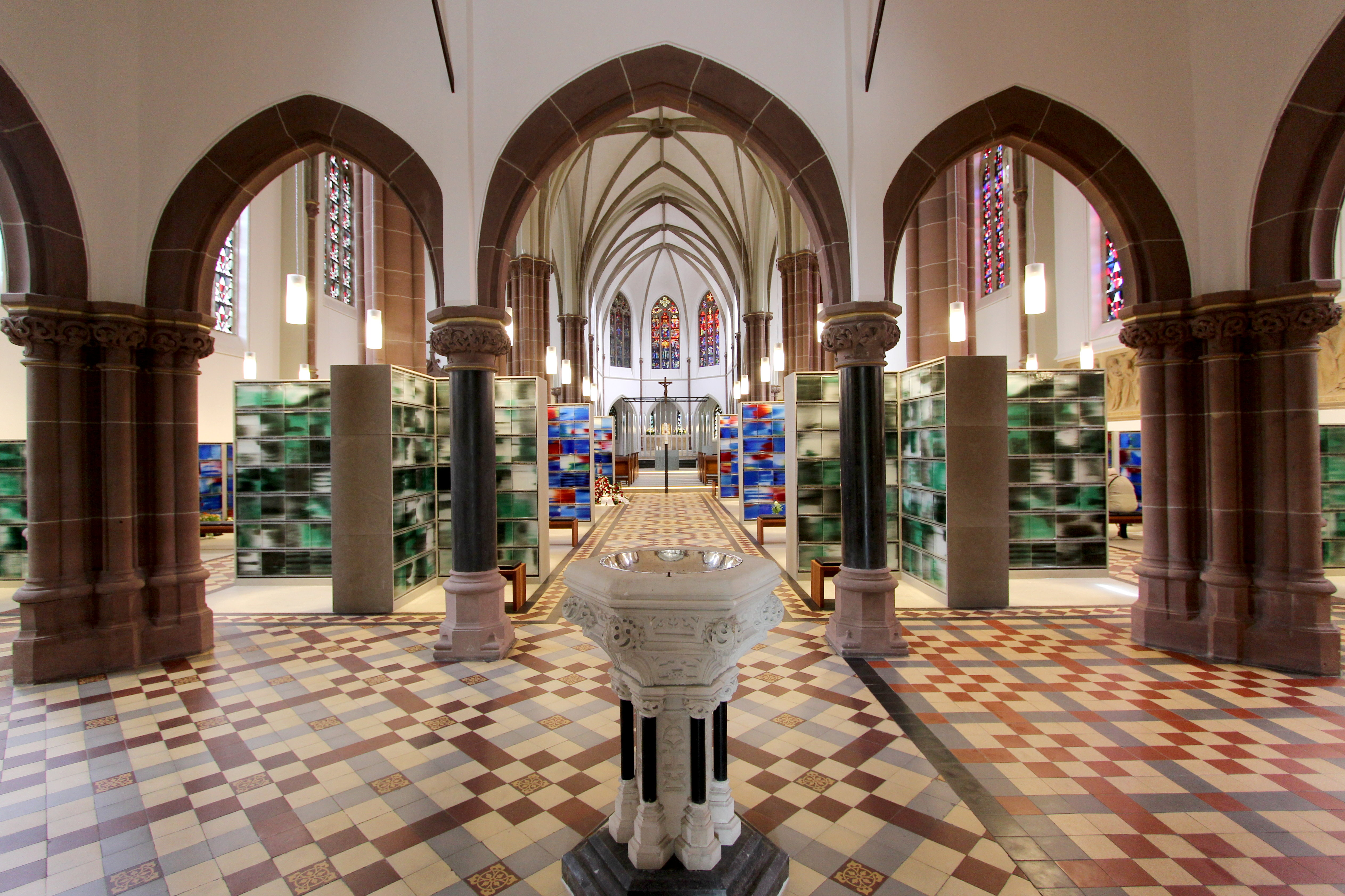 41236 Mönchengladbach-Rheydt. St. Josef Kirche, Bauzeit: 1903-1905, Adresse: Keplerstraße 75a in Mönchengladbach (OT Ry-Mitte), Eintrag in die Denkmalliste: 14.10.1986. Aufnahme von 2018.